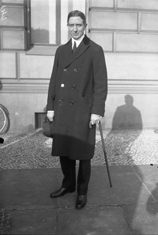 Parker Gilbert tritt in das Bankhaus Morgan ein! Der frühere General-Agent für die deutschen Reparationszahlungen Parker Gilbert ist in das bekannte Bankhaus I.P. Morgan & Co. in New York als Teilhaber eingetreten